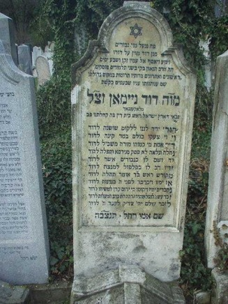 מצה רבי דוד לקנבך